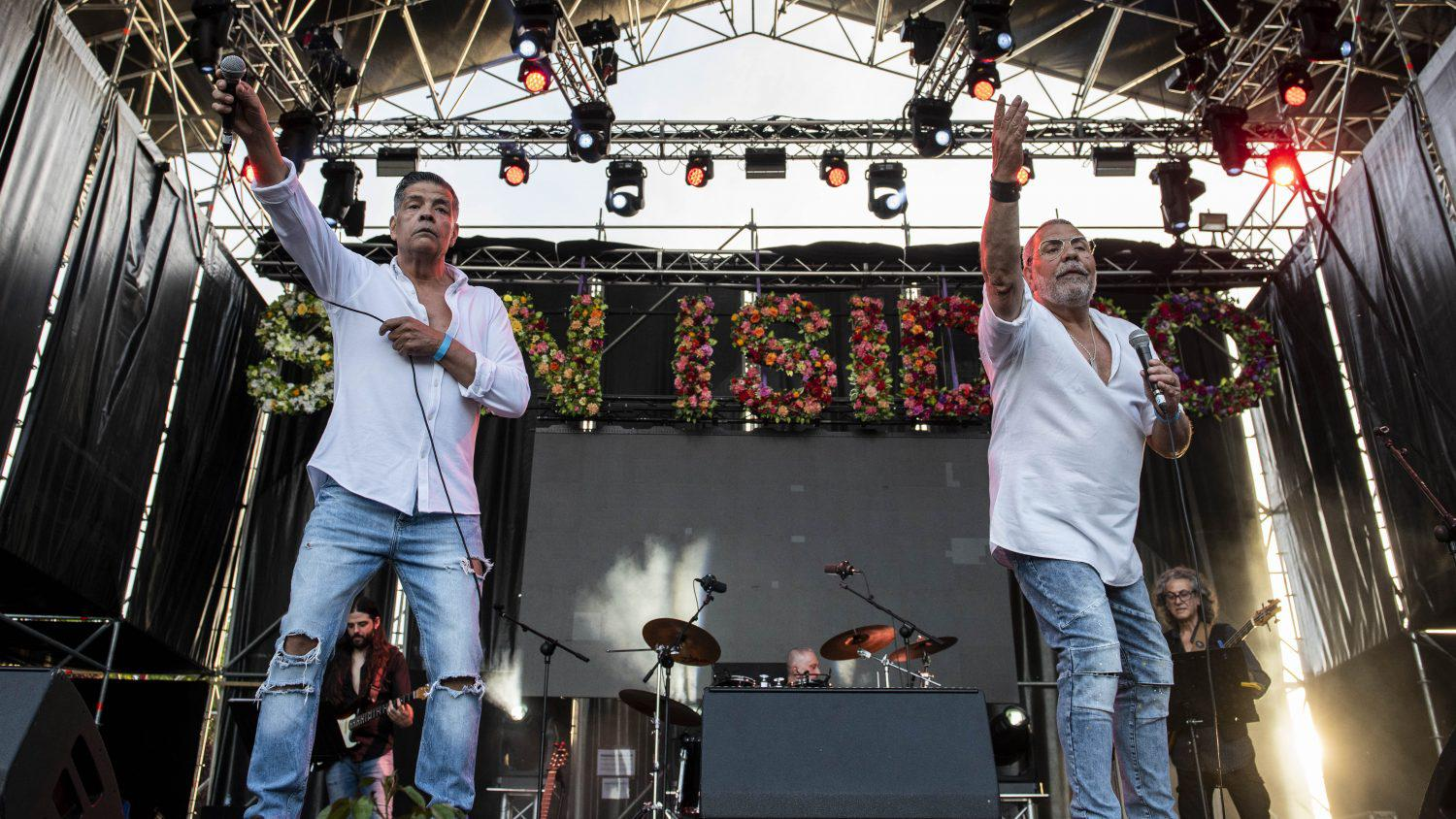 Los sonidos más rumberos se apoderaron ayer de la noche madrileña. Miles de personas abarrotaron los escenarios, a un lado y a otro del río.